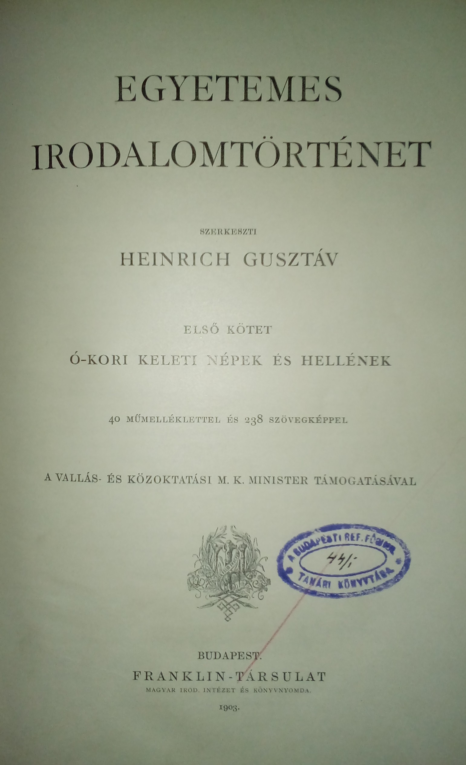 Egyetemes irodalomtörténet